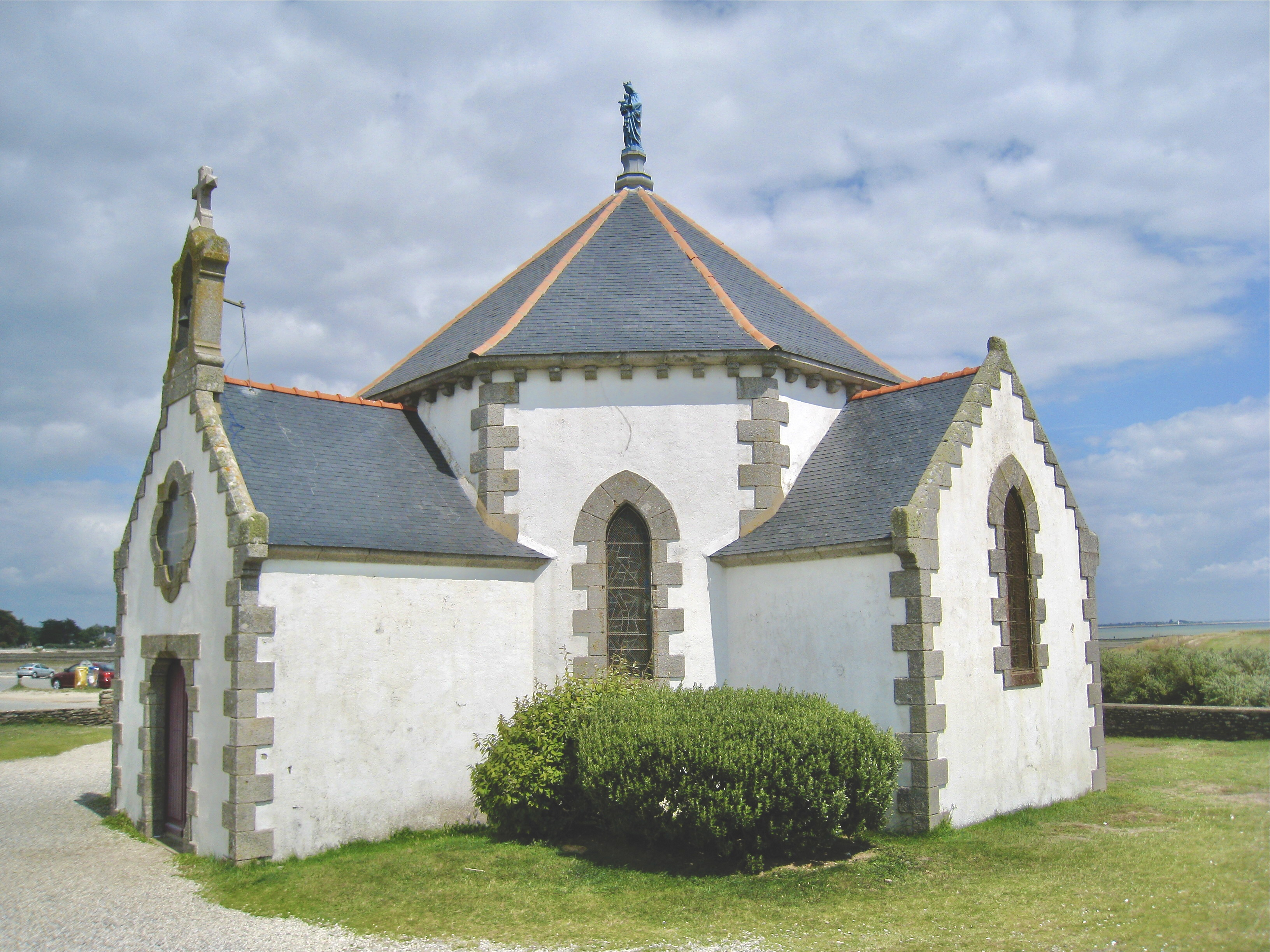 Chapelle Notre-Dame-de-la-Côte de Penvins, Commune de Sarzeau, Morbihan, France